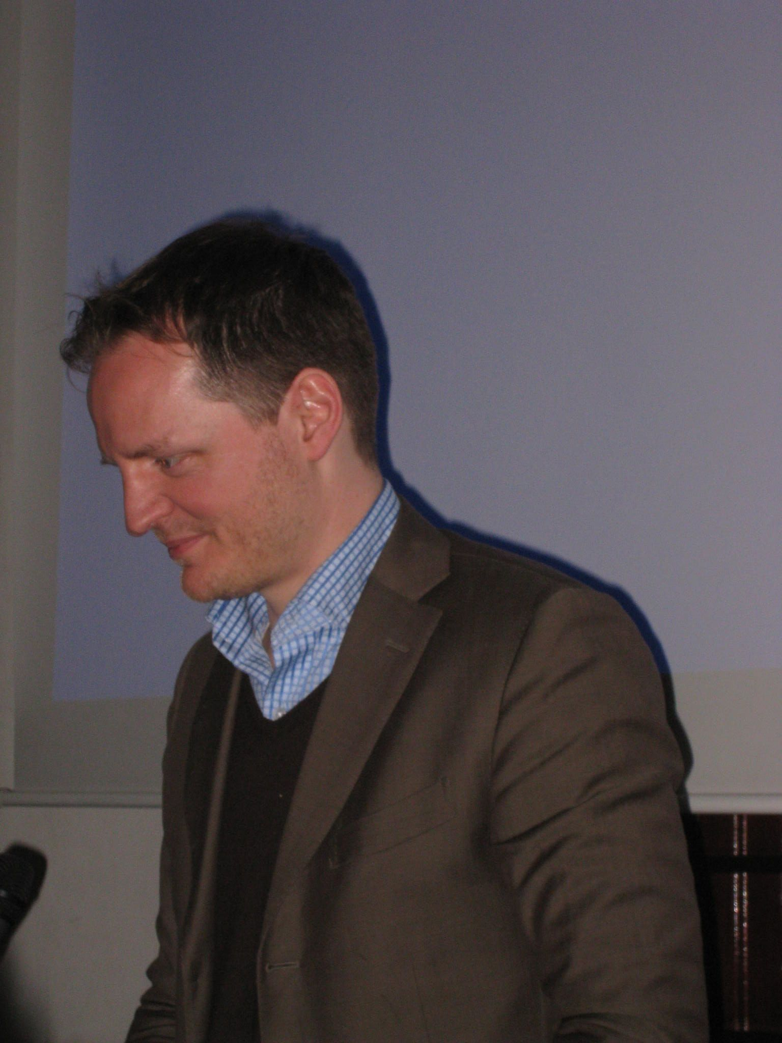 Hans Op de Beeck, 2007